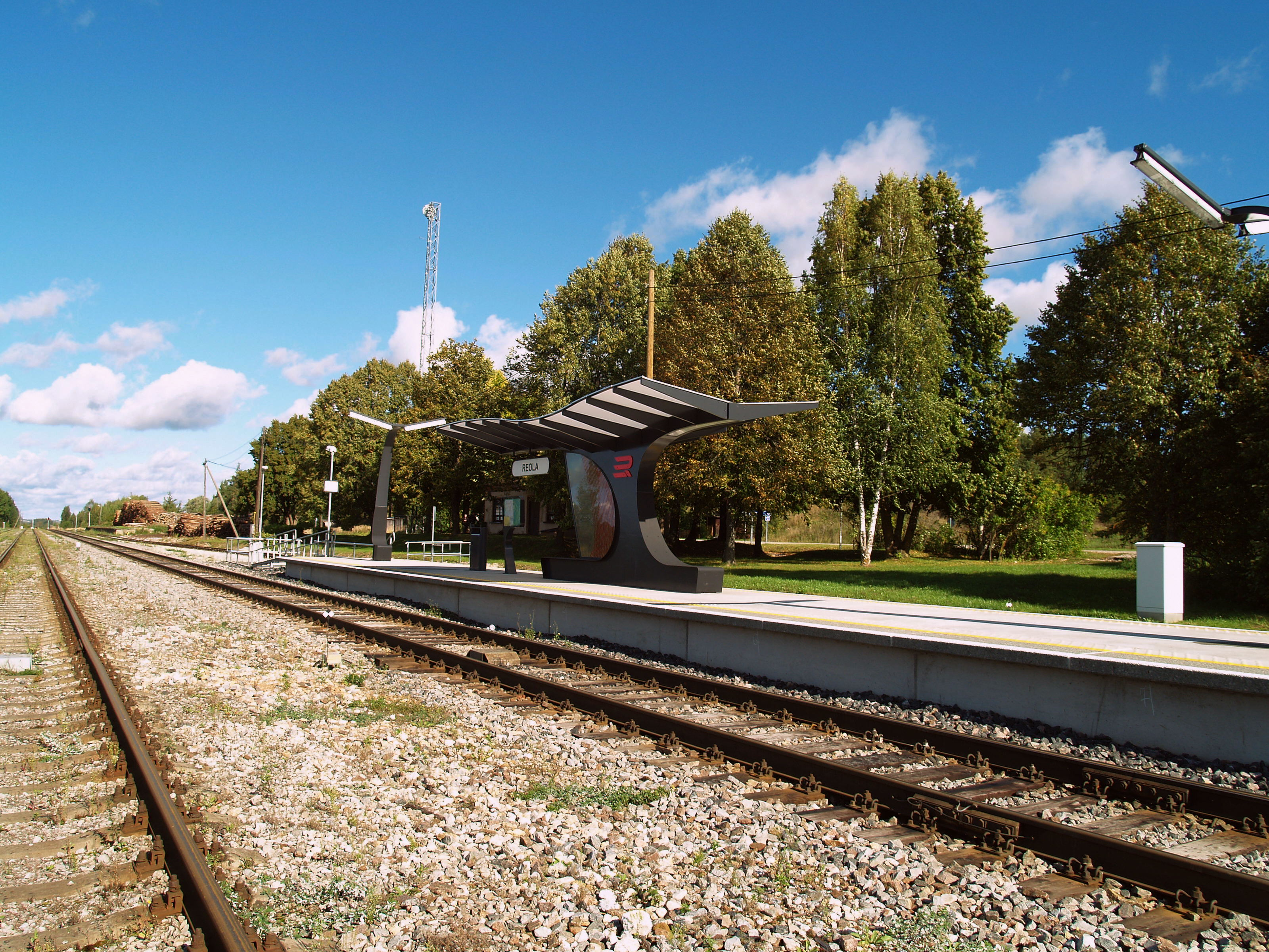 Reola raudteejaam